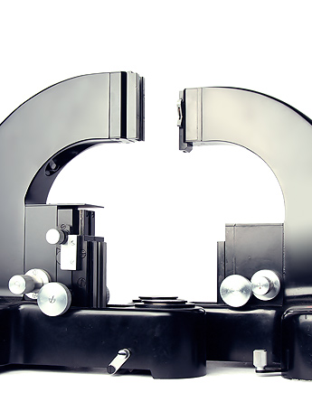 Unterschied der Stativausführungen